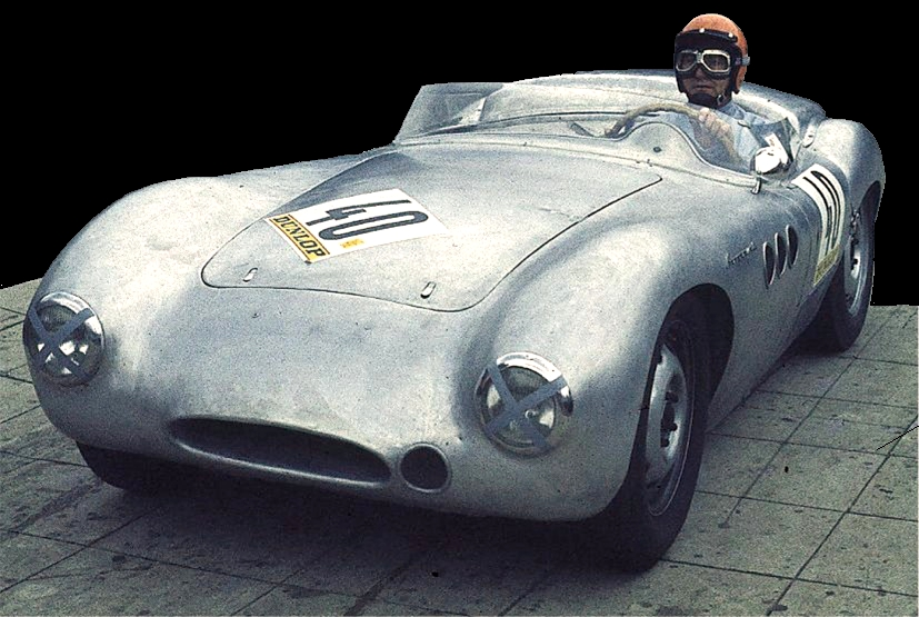 Borgward RS, Baujahr 1958 (?), mit Heckaufsatz, gefahren von Fritz Jüttner beim AvD-Oldtimer-Grand-Prix. Jüttner war Werksfahrer von Borgward.